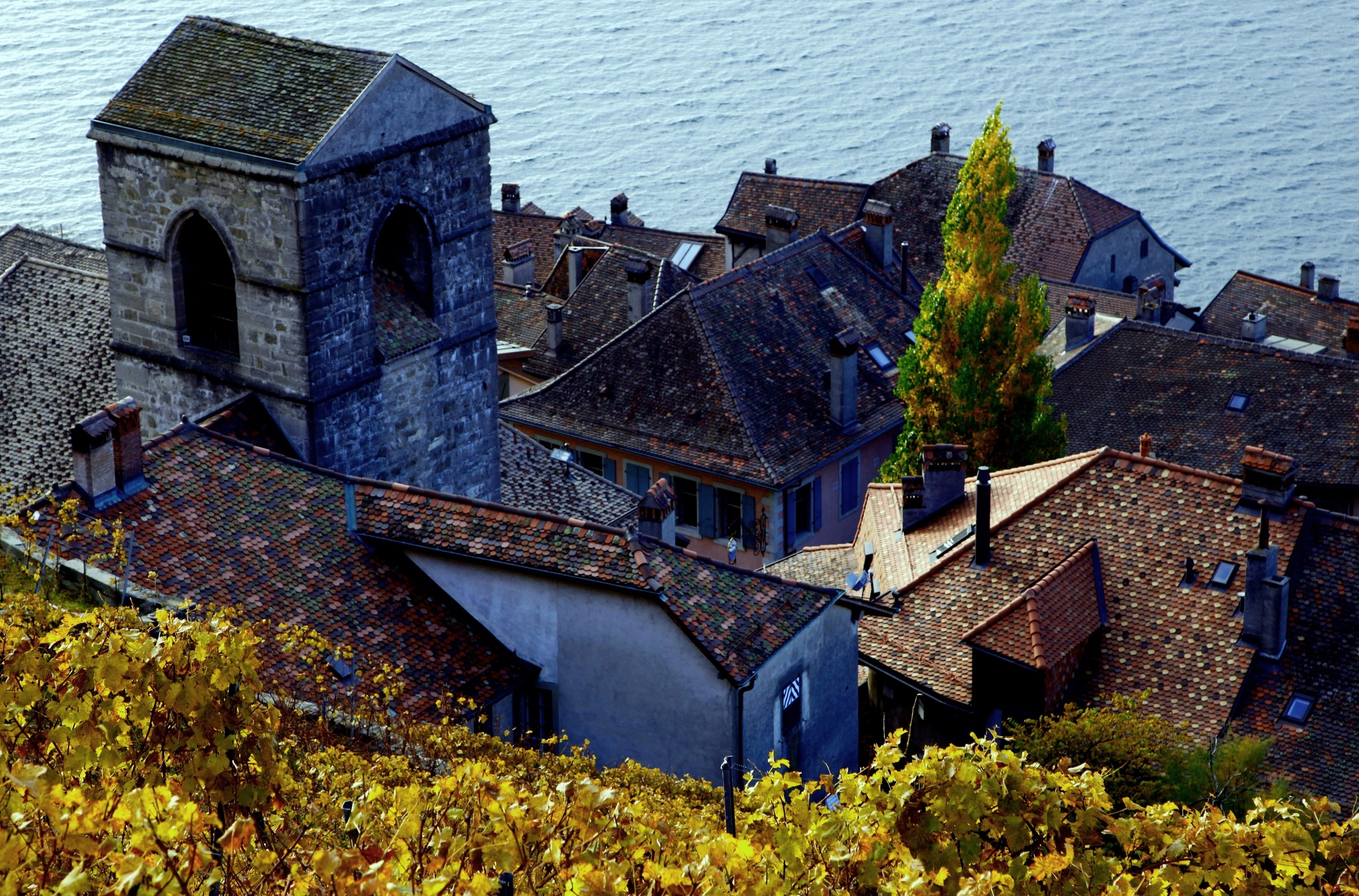 Photos pour concours Wikilovesmonuments Vaud Suisse